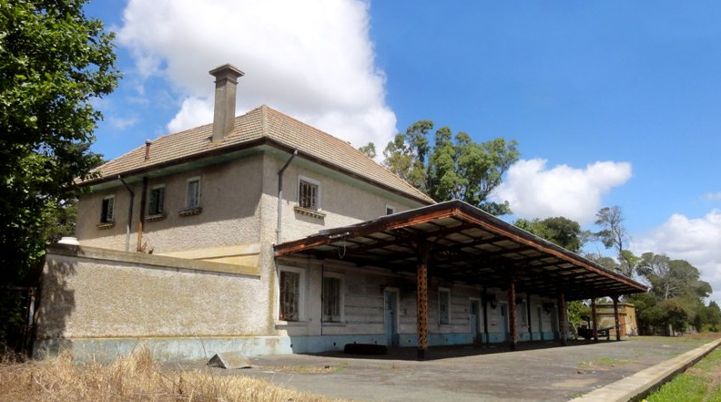 Estación Fulton del FCGR, Buenos Aires, Argentina